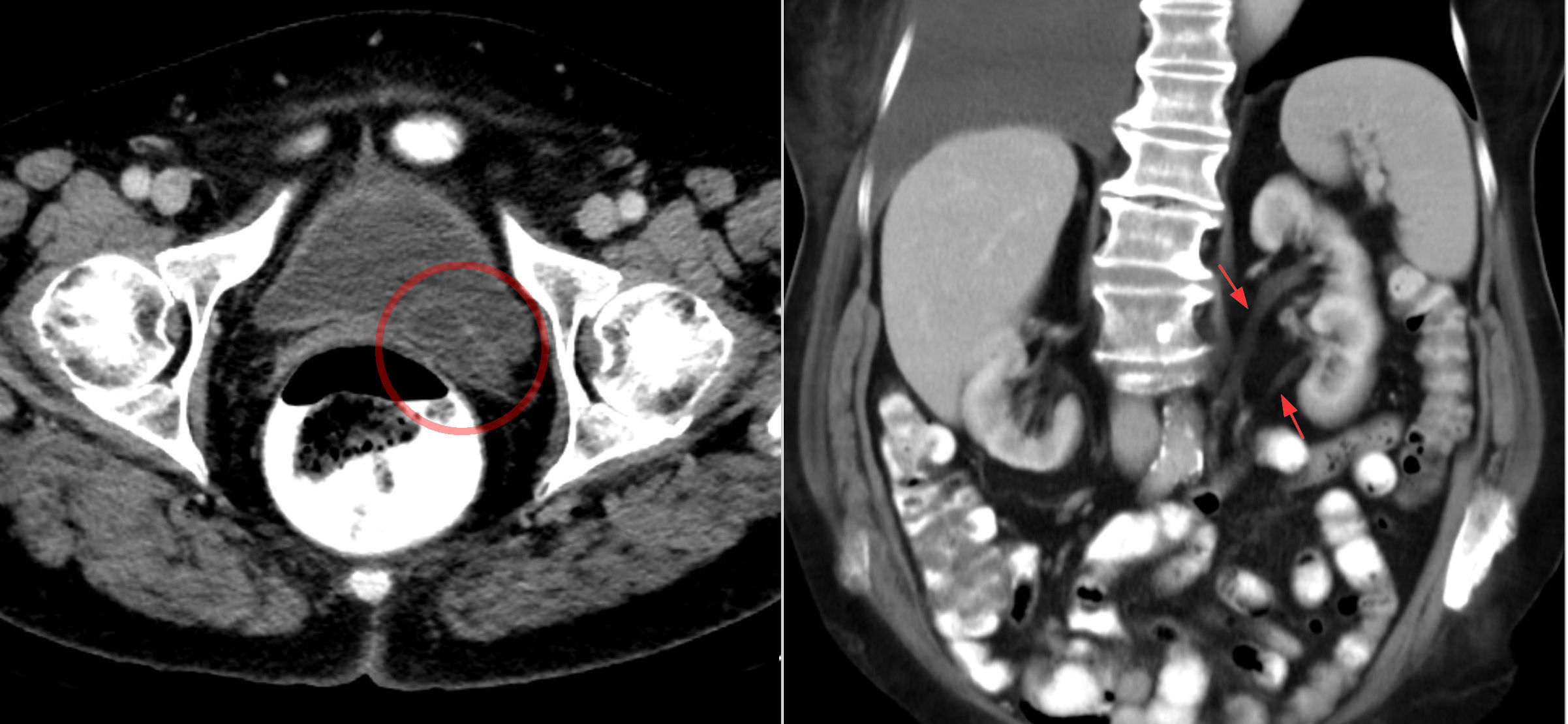 Ureterozele in der Computertomographie: Man erkennt in der axialen Schicht (linkes Bild) eine Auftreibung des von hinten in die Blase einmündenden linken Ureters (rechts im Bild). Das rechte Bild (koronar) zeigt die typischerweise dabei vorhandene Doppelanlage der linken Niere, wobei der Ureter aus der oberen Anlage unten in die Zele mündet.